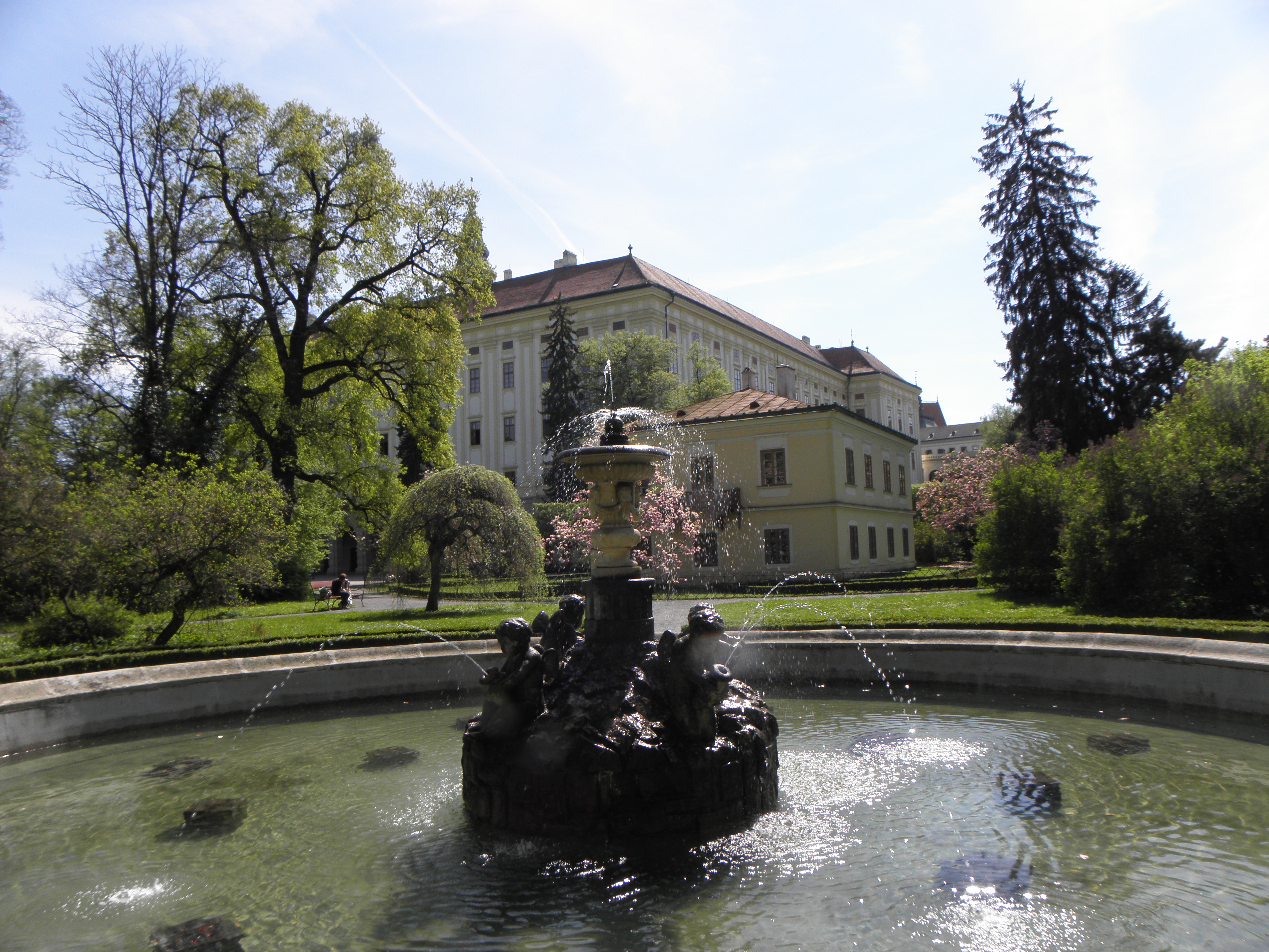 Arcibiskupský palác v Kroměříži, fontána v Podzámecké zahradě